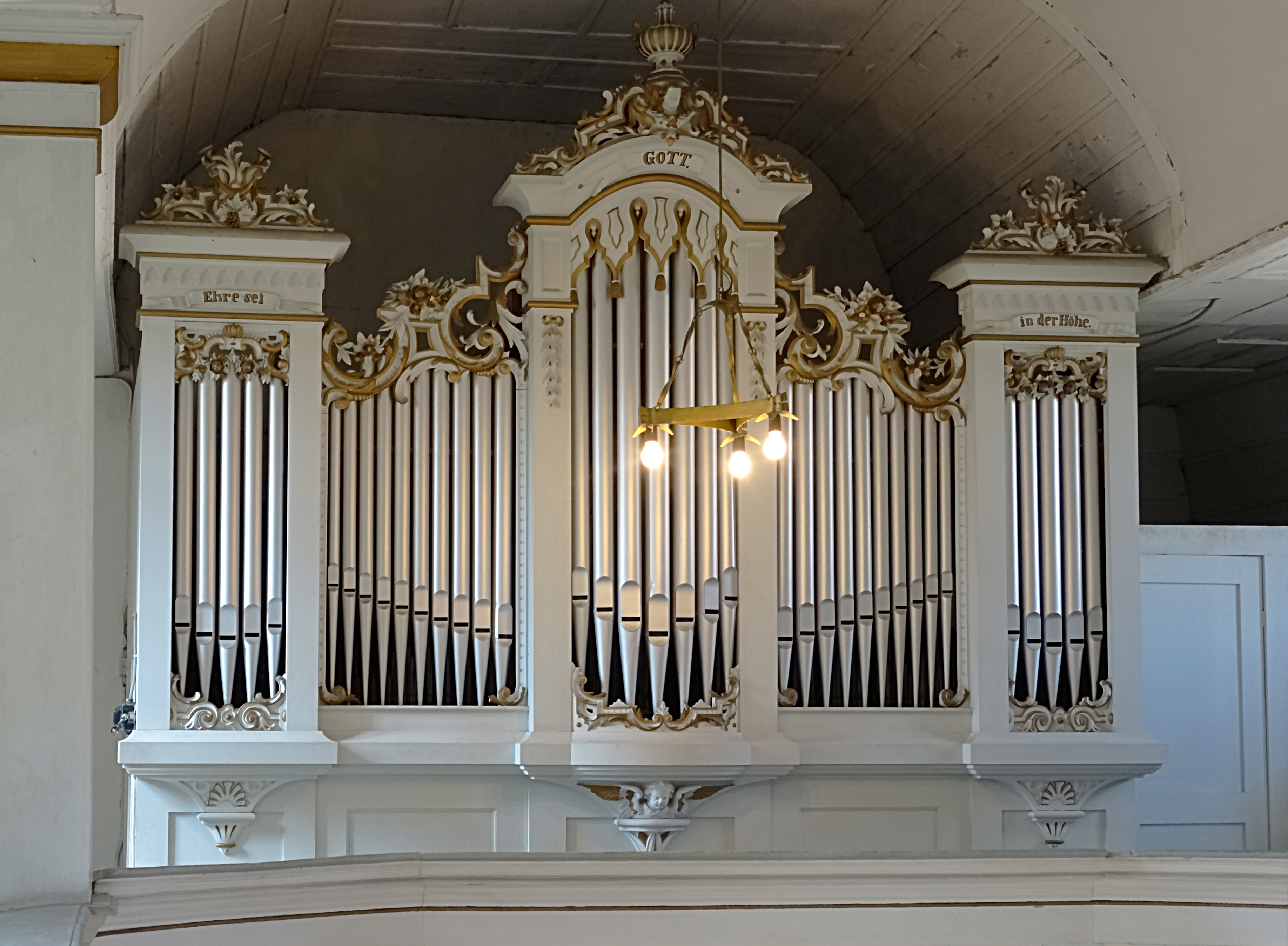 Orgel von Edmund Schulze (1868) in der Dorfkirche Sankt Matthias Eischleben